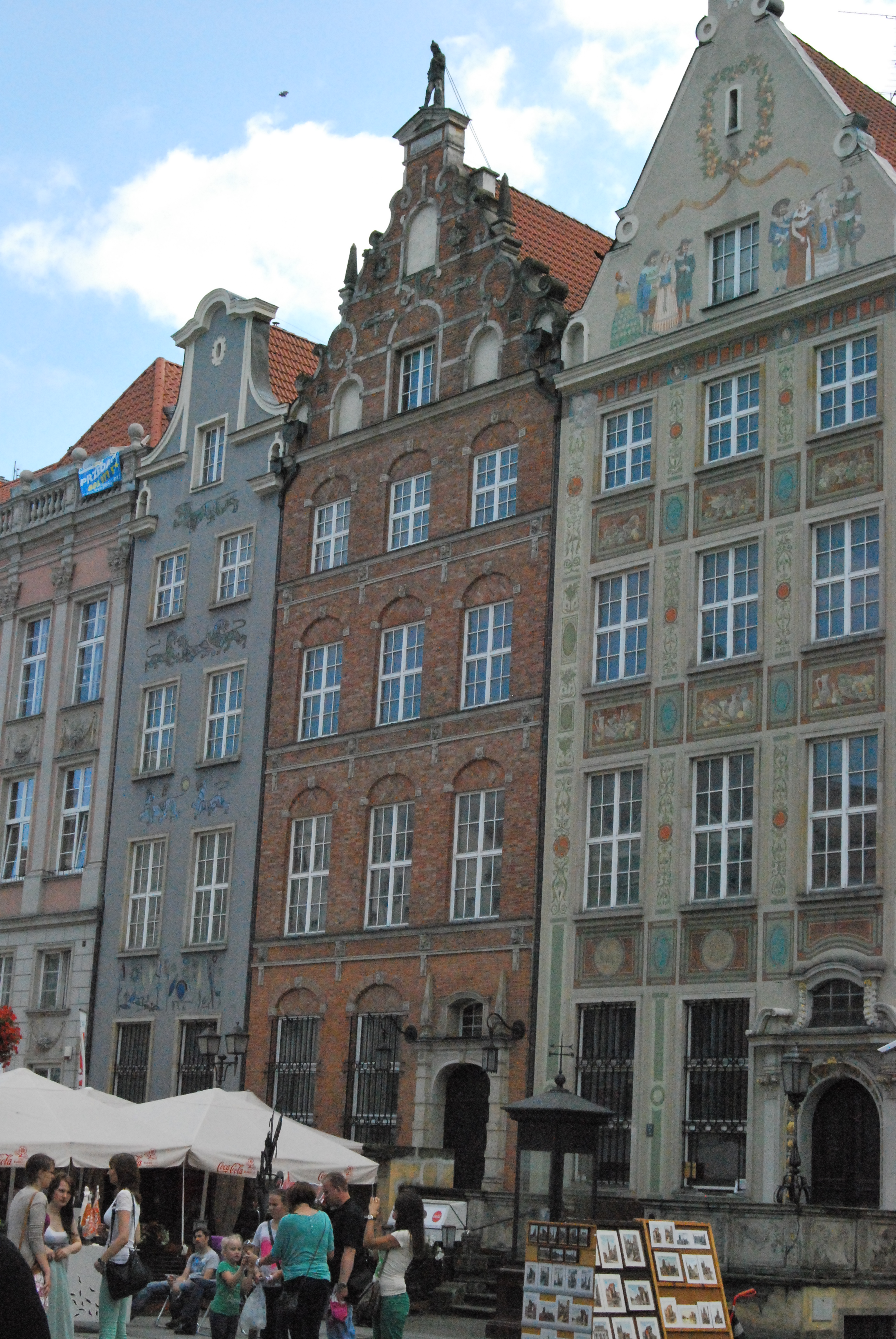 Gdańsk Główne Miasto - kamienice przy Długim Targu, od lewej 17 (fragment), 16, 15 i 14 (fragment)